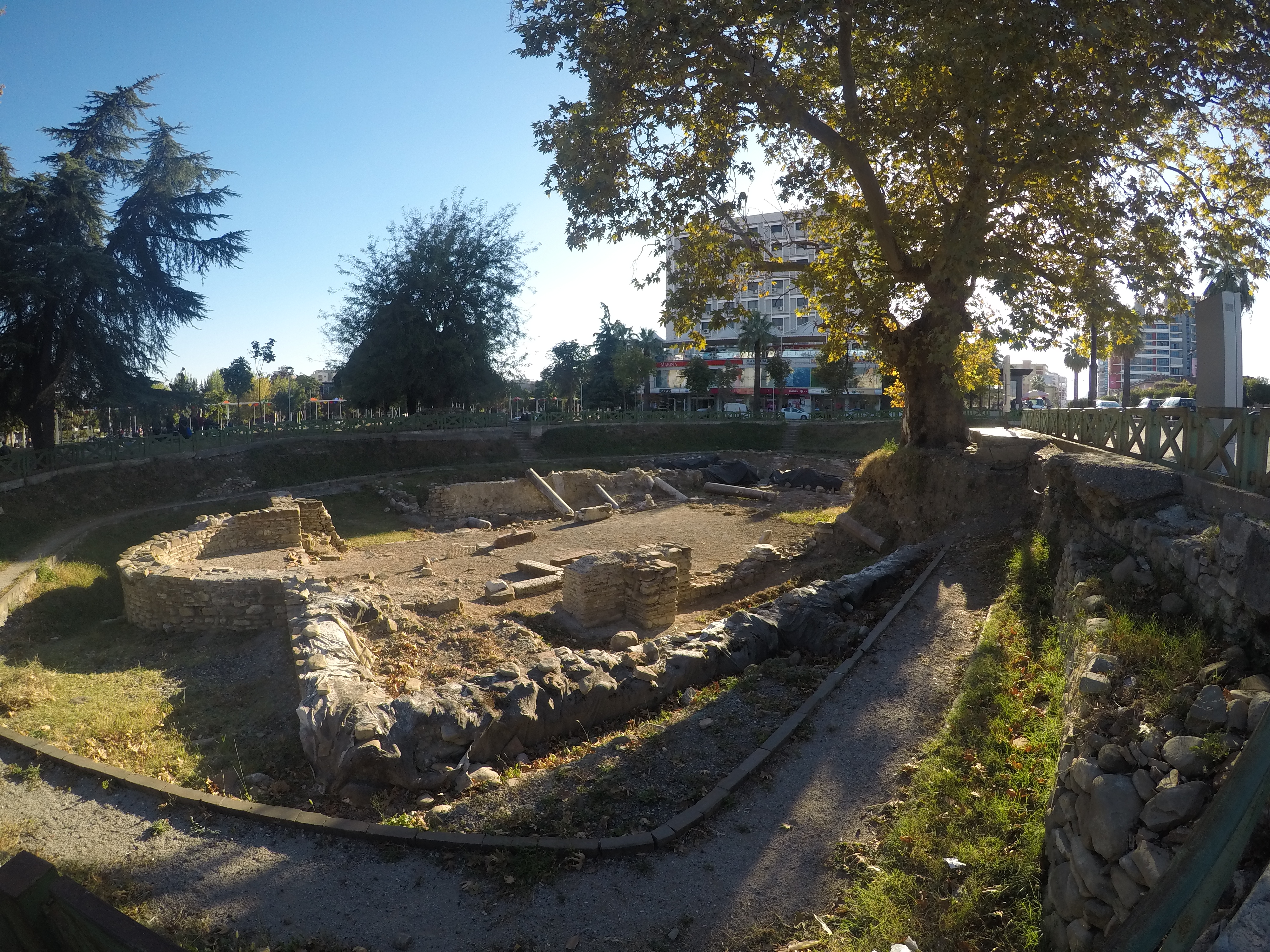 Bazilika Paleokristiane (Elbasan)